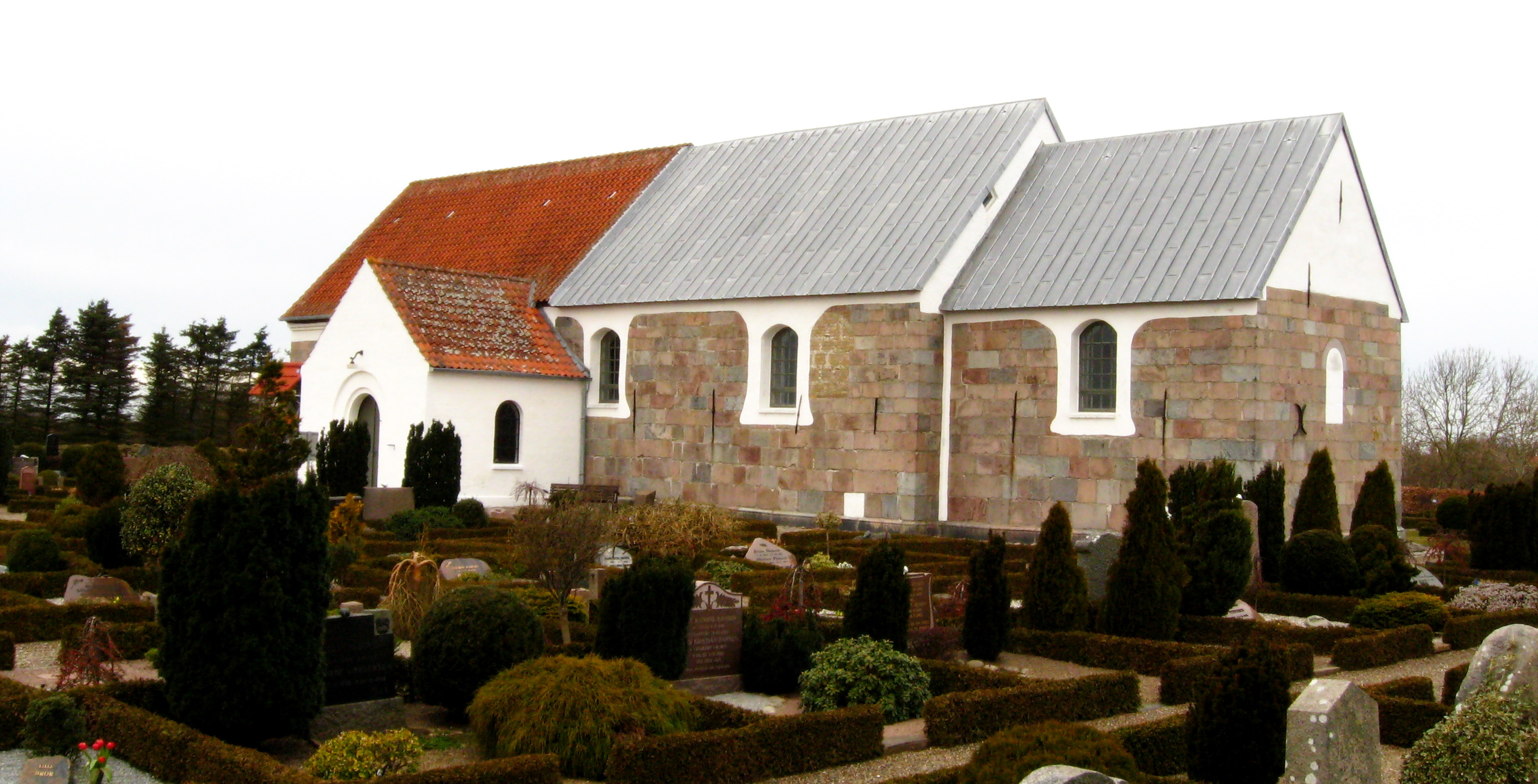 Rakkeby Kirke, Hjørring Kommune